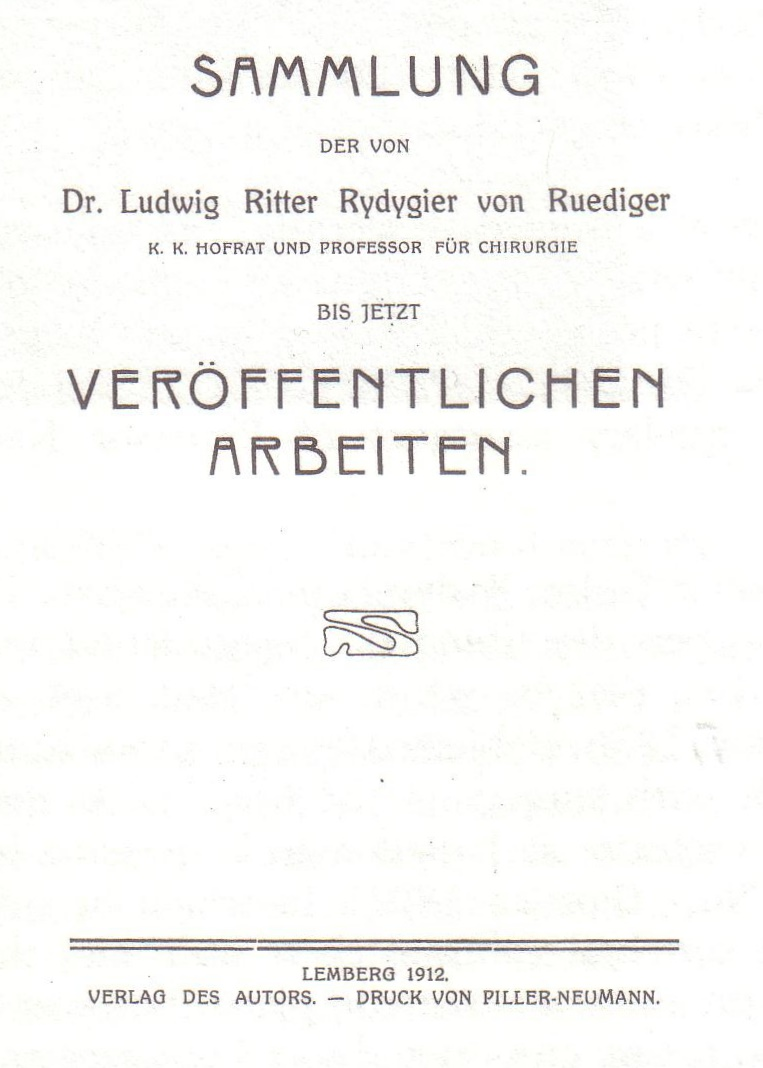 Titelblatt des Schriftenverzeichnisses von Prof. Dr. Ludwik von Rydygier